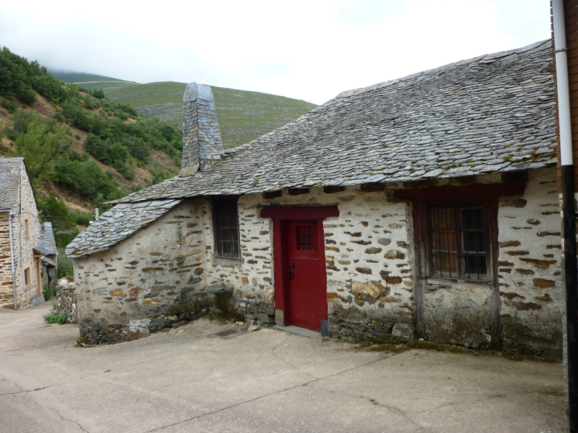 Rincón típico de Pobladura de la Sierra (León)